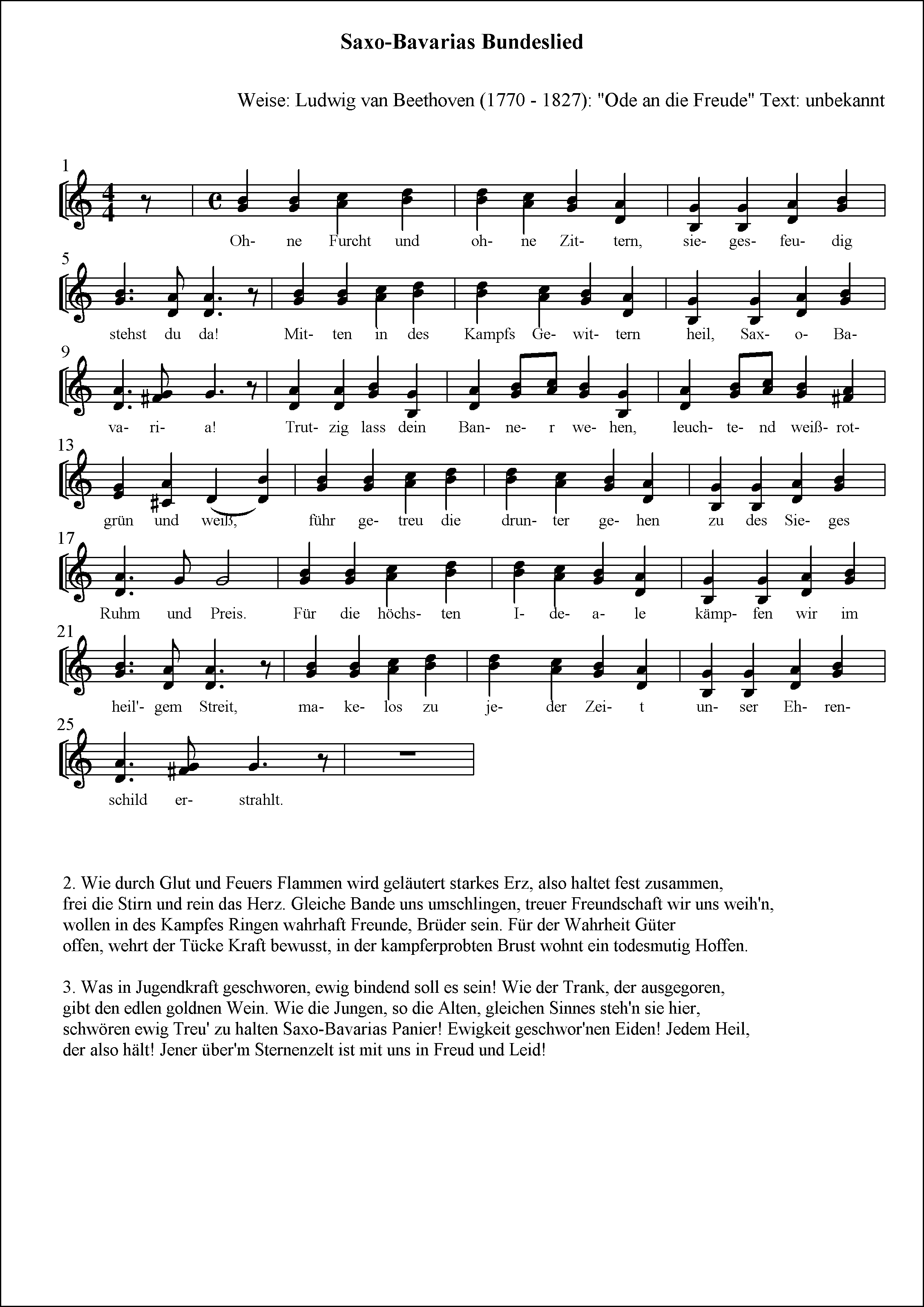 Bundeslied der Saxo-Bavaria Prag (jetzt: Wien)